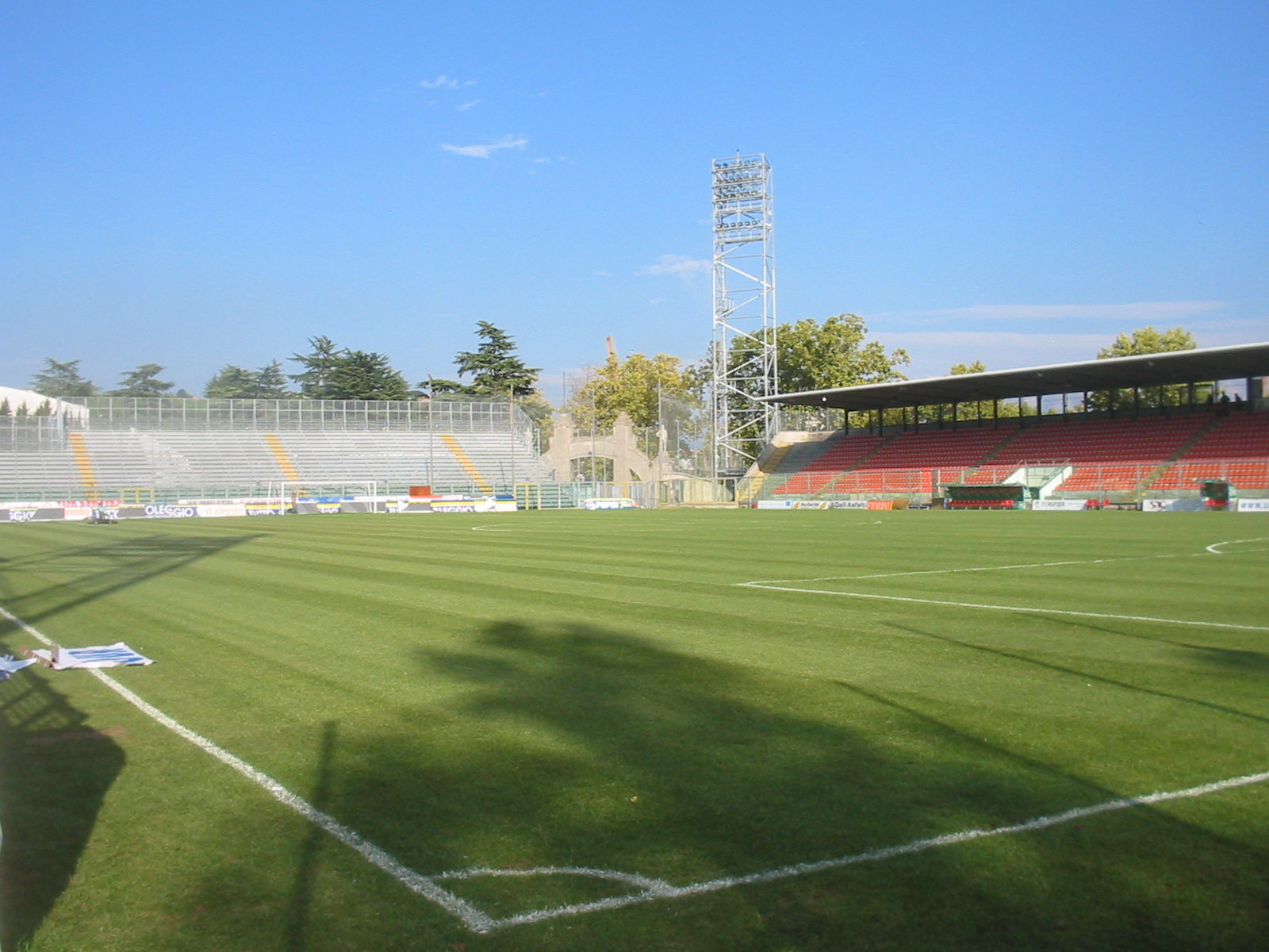 Il terreno di gioco dell' Alberto Picco.